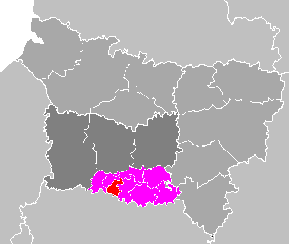 Maps of arrondissements and cantons of France: Département de l'Oise